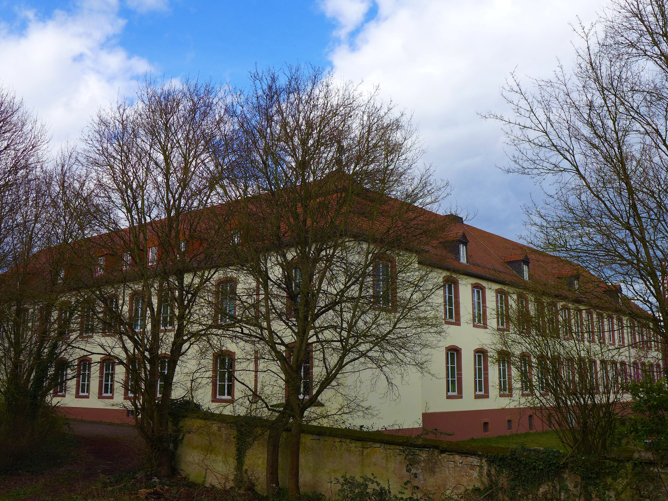 Ehemalige adelige Frauenabtei Fraulautern, Südwest-Ecke